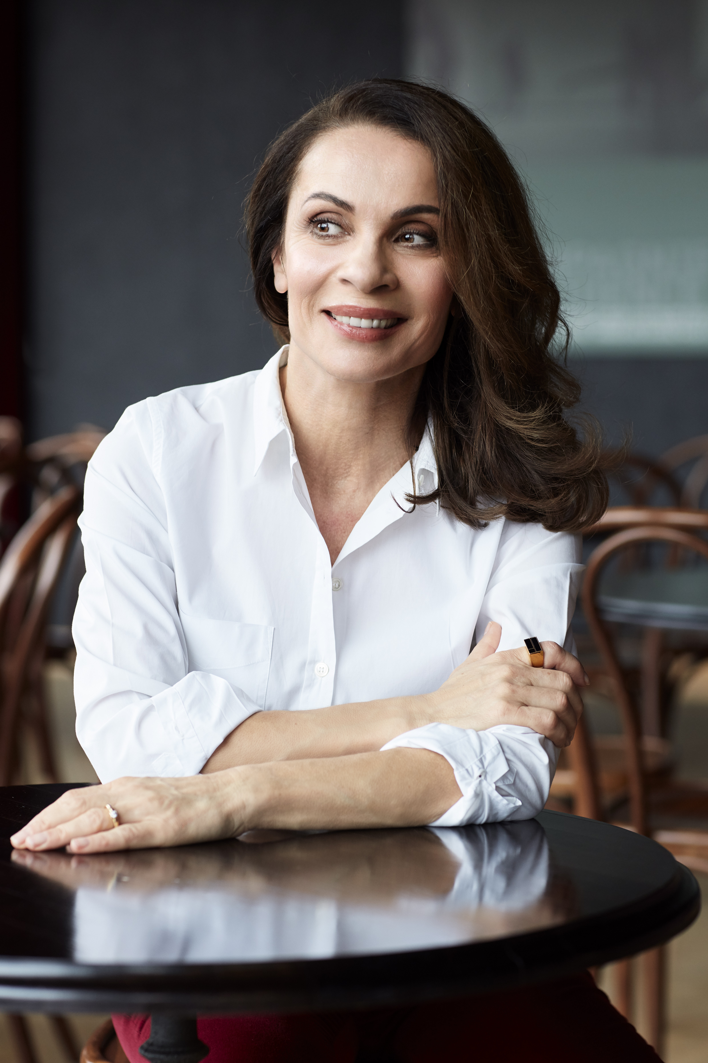 Portrait